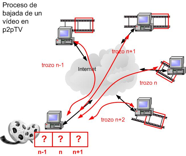 (Imagen generada con Microsoft Visio y alguna imagen libre (film de la película)